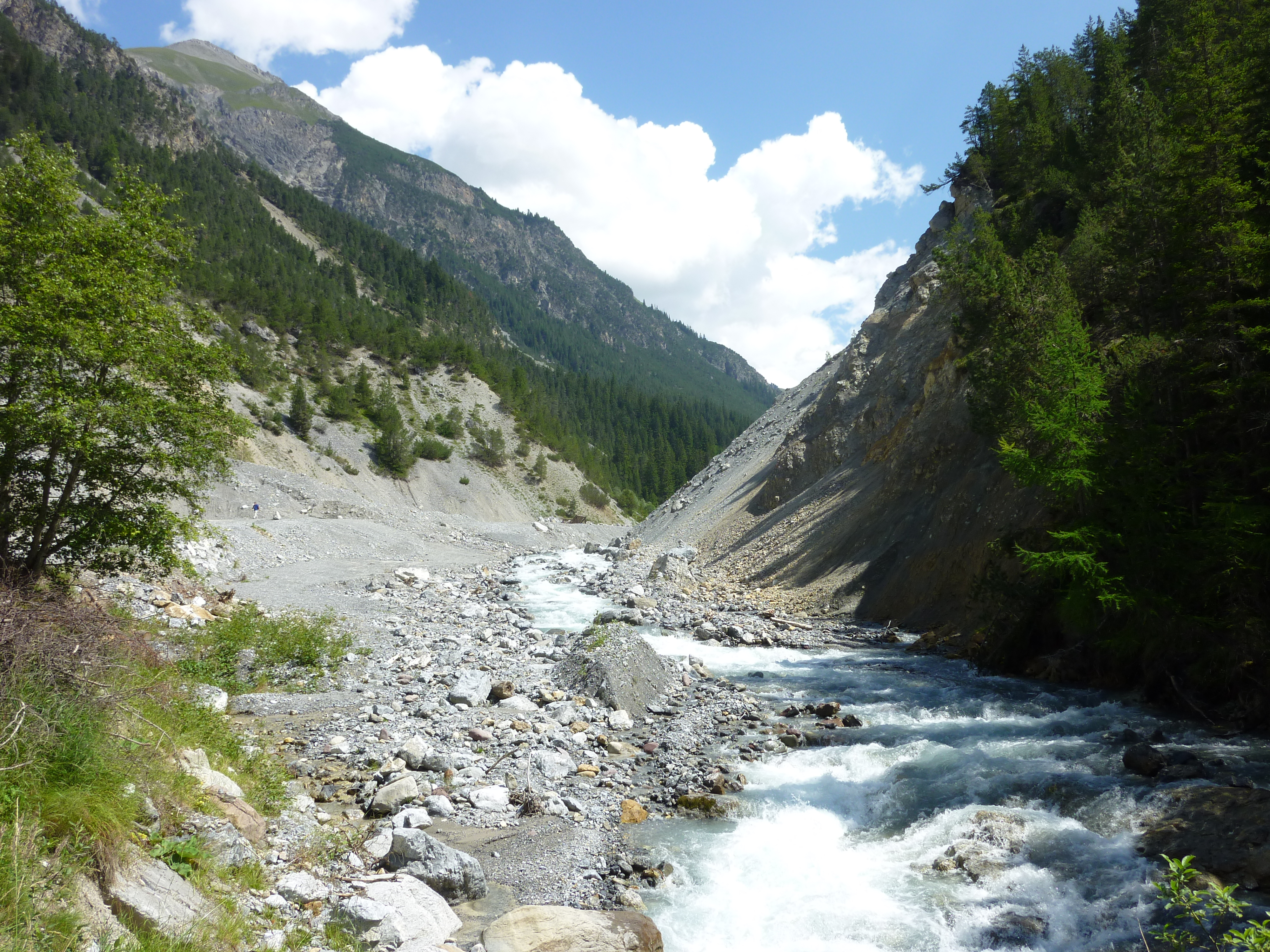 Val Tuors